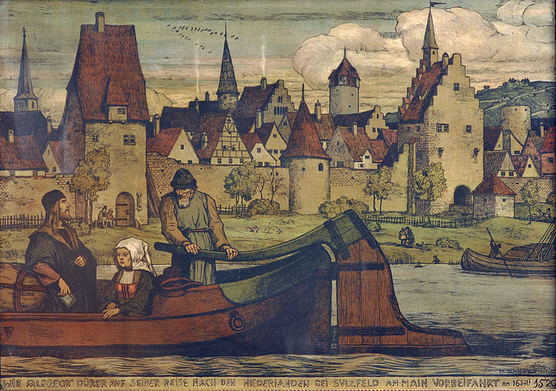 “Wie Albrecht Dürer auf seiner Reise nach den Niederlanden an Sulzfeld am – Main vorbeifährt am 16. Juli 1520”. Farblithographie, 1903. Blattgröße : 70 x 99 cm. Verlag Robert Voigtländer, München 1903.